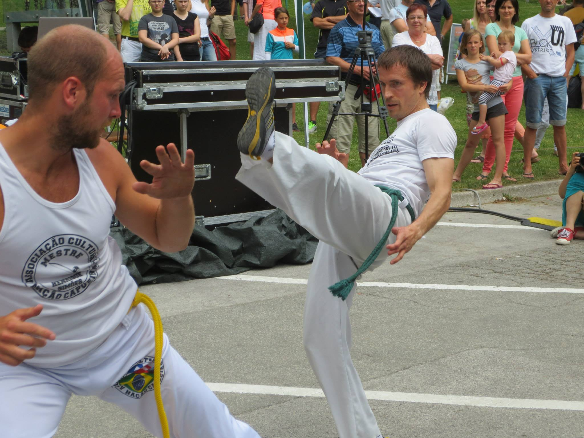 predstavitev Capoeire na Bledu - ulična igra